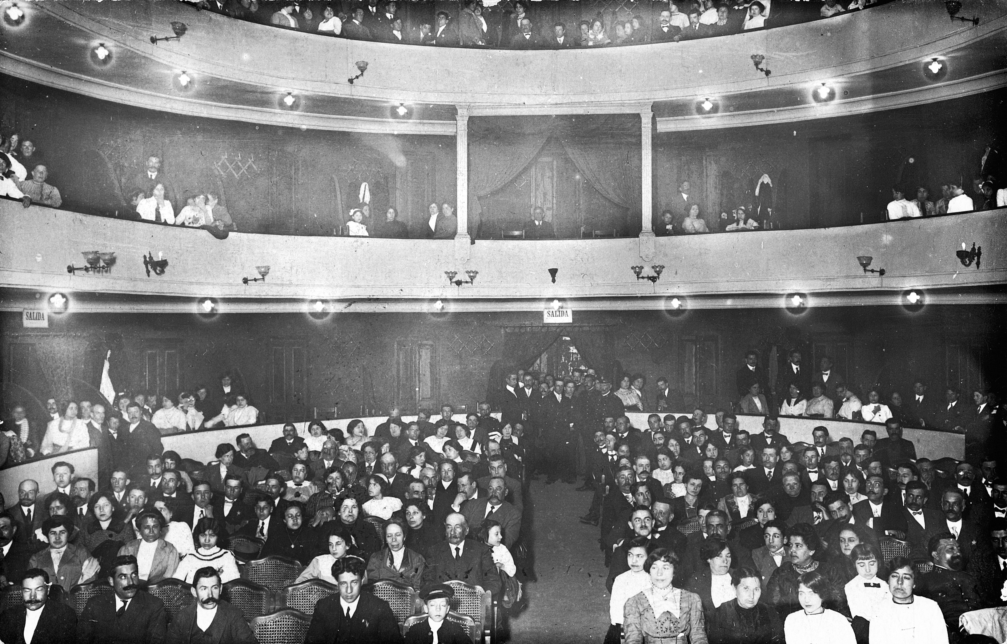 IX Congrés Esperantista de la Kataluna Esperantista Federacio a la ciutat de Girona. Vista de la platea i les llotges del Teatre Municipal amb nombrós públic assistent al concert del Trio Barcelona en honor als congressistes.